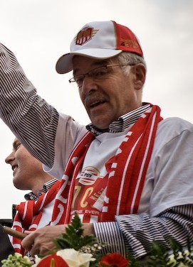 Sef Vergoossen